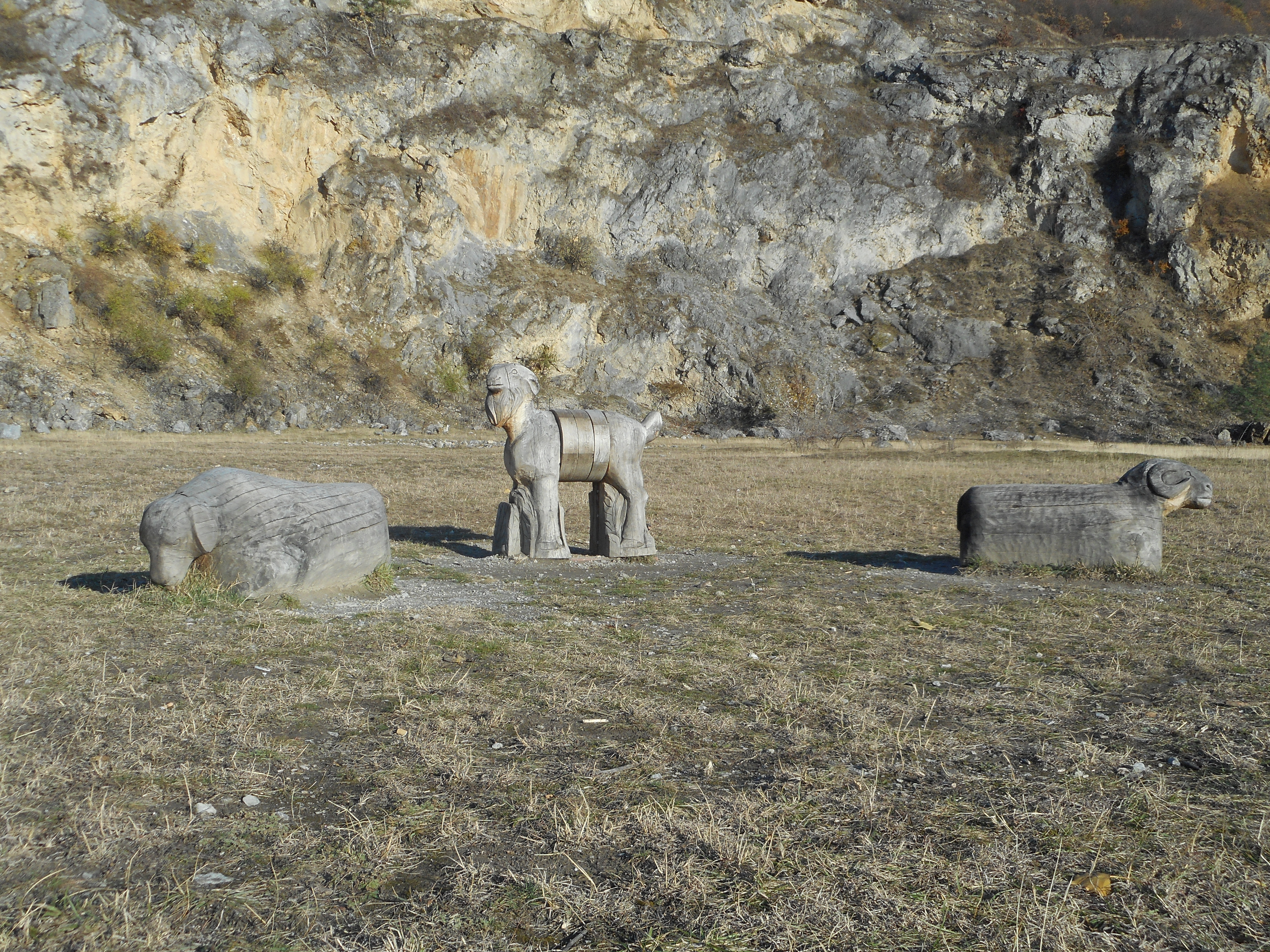 Ovca, koza a baran ako symbol obnovenia pastvy na území devínskej Kobyly